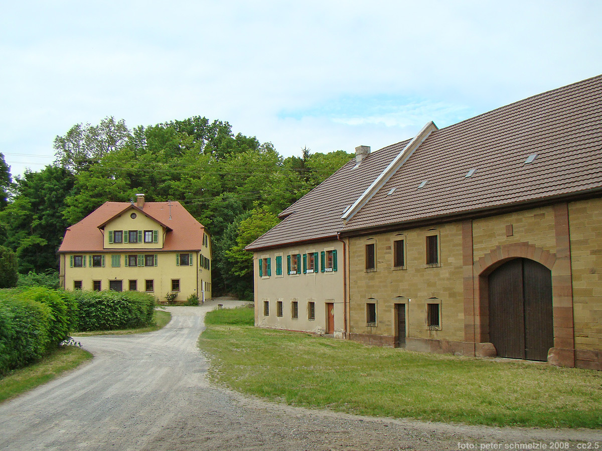 Pfarrhaus (auch Jägerhaus, links) und Mühle (rechts) im Hipfelhof bei Heilbronn-Frankenbach